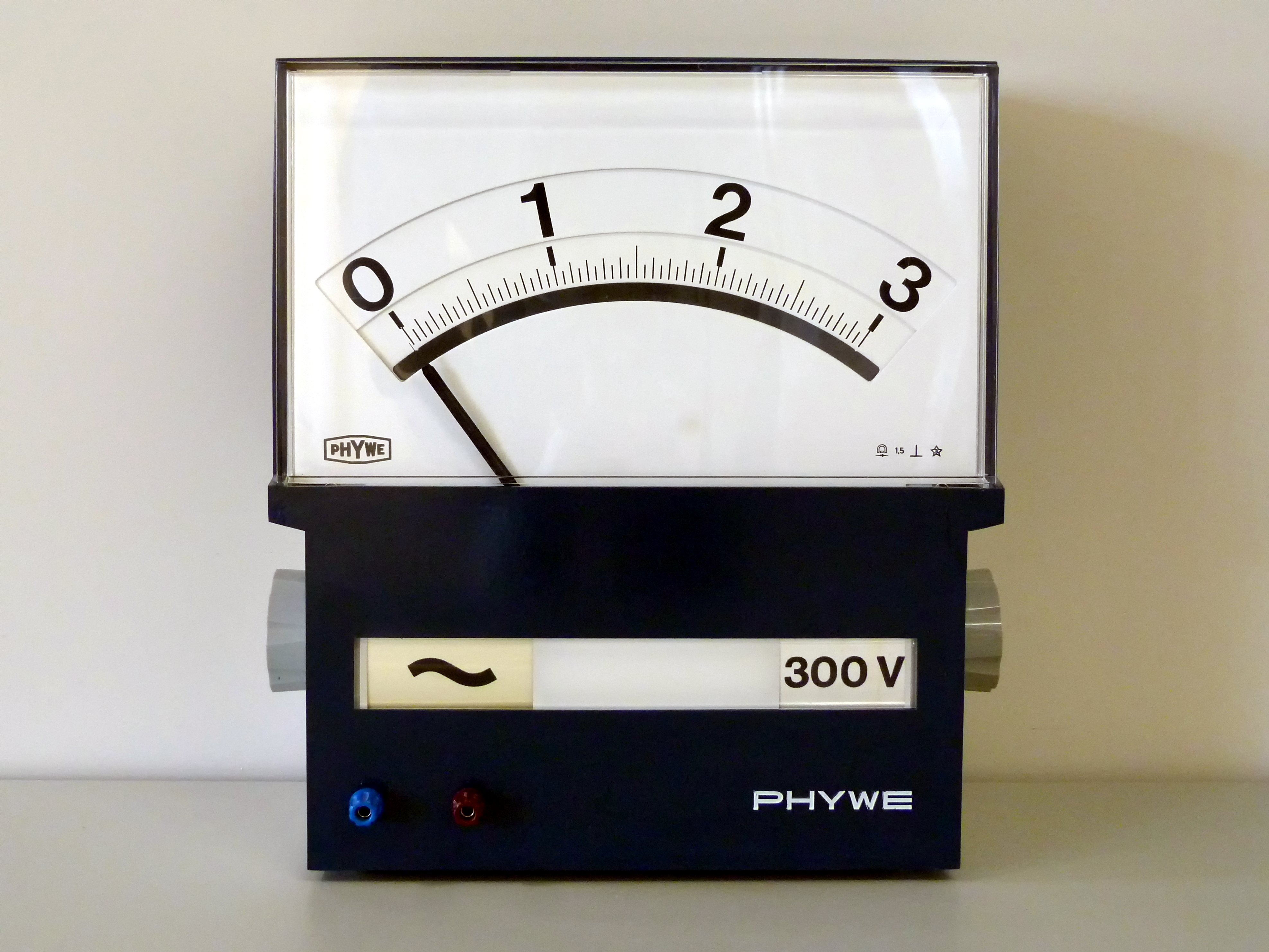 Ein Multimeter für Lehrzwecke der Firma PHYWE, Baujahr um 1970